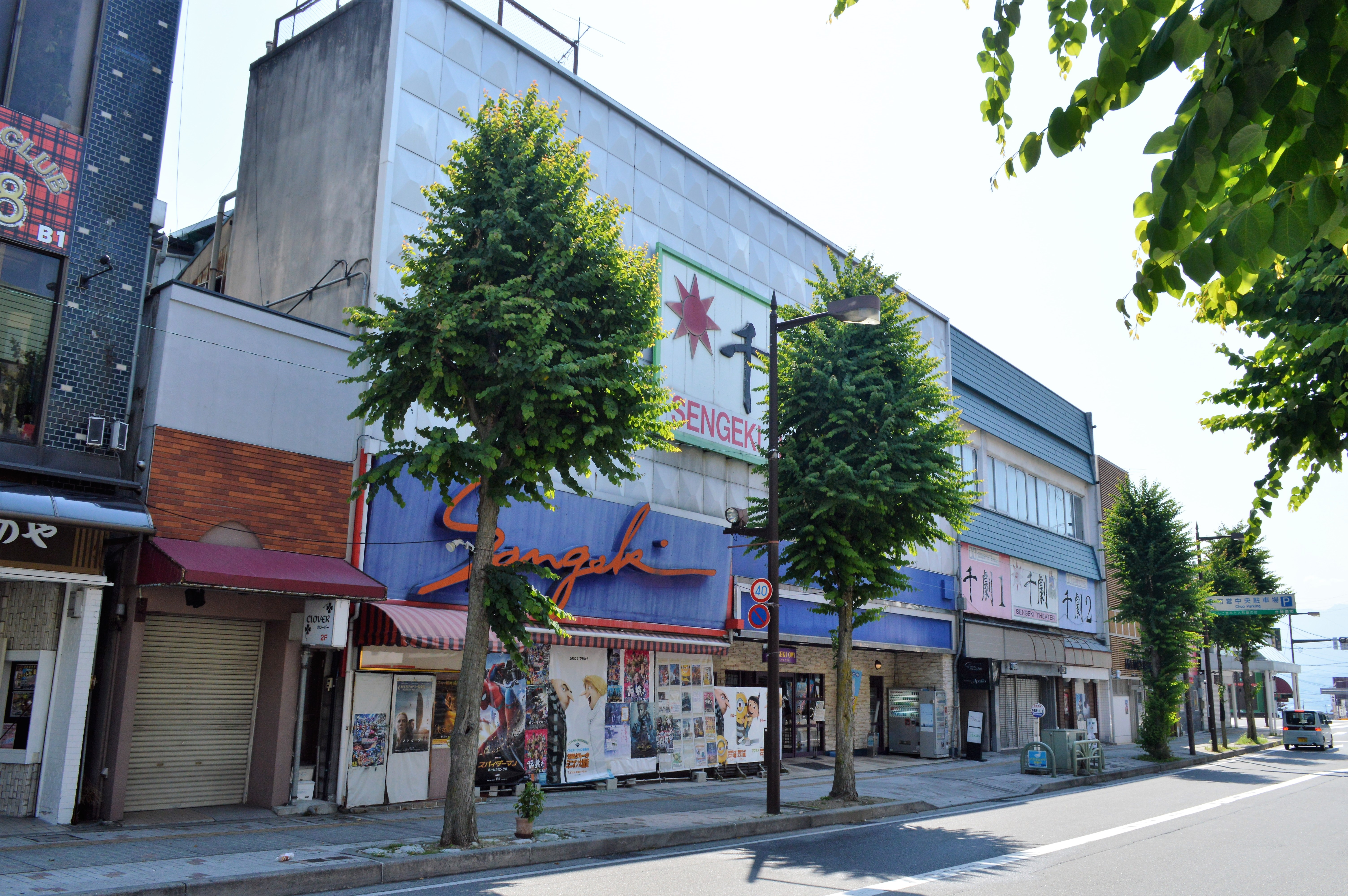 長野県飯田市の映画館「飯田センゲキシネマズ」。